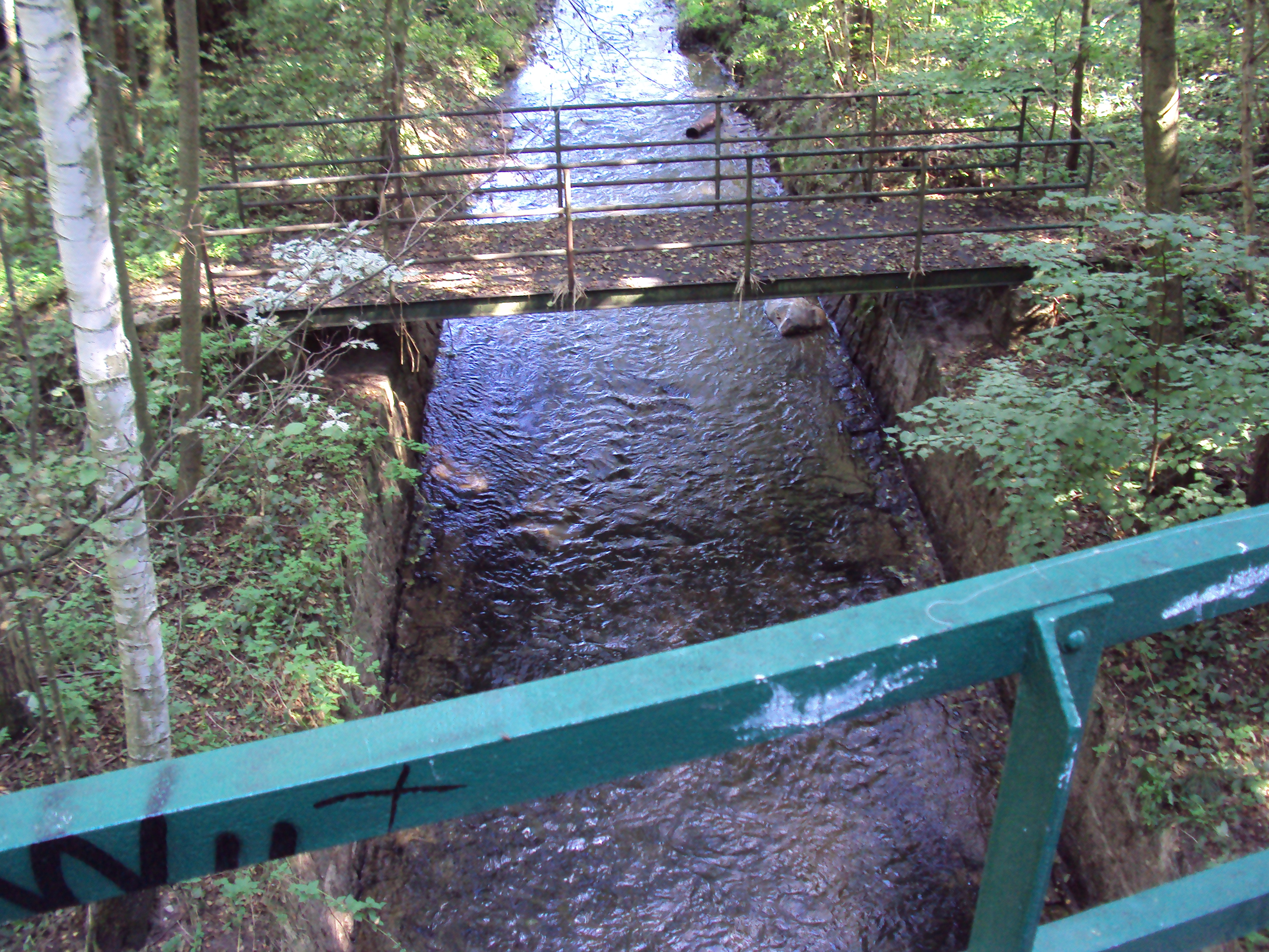 Přemostění Dobranovského potoka z Cyklostezky Vlčí Důl, blízko je soutok z Ploučnicí